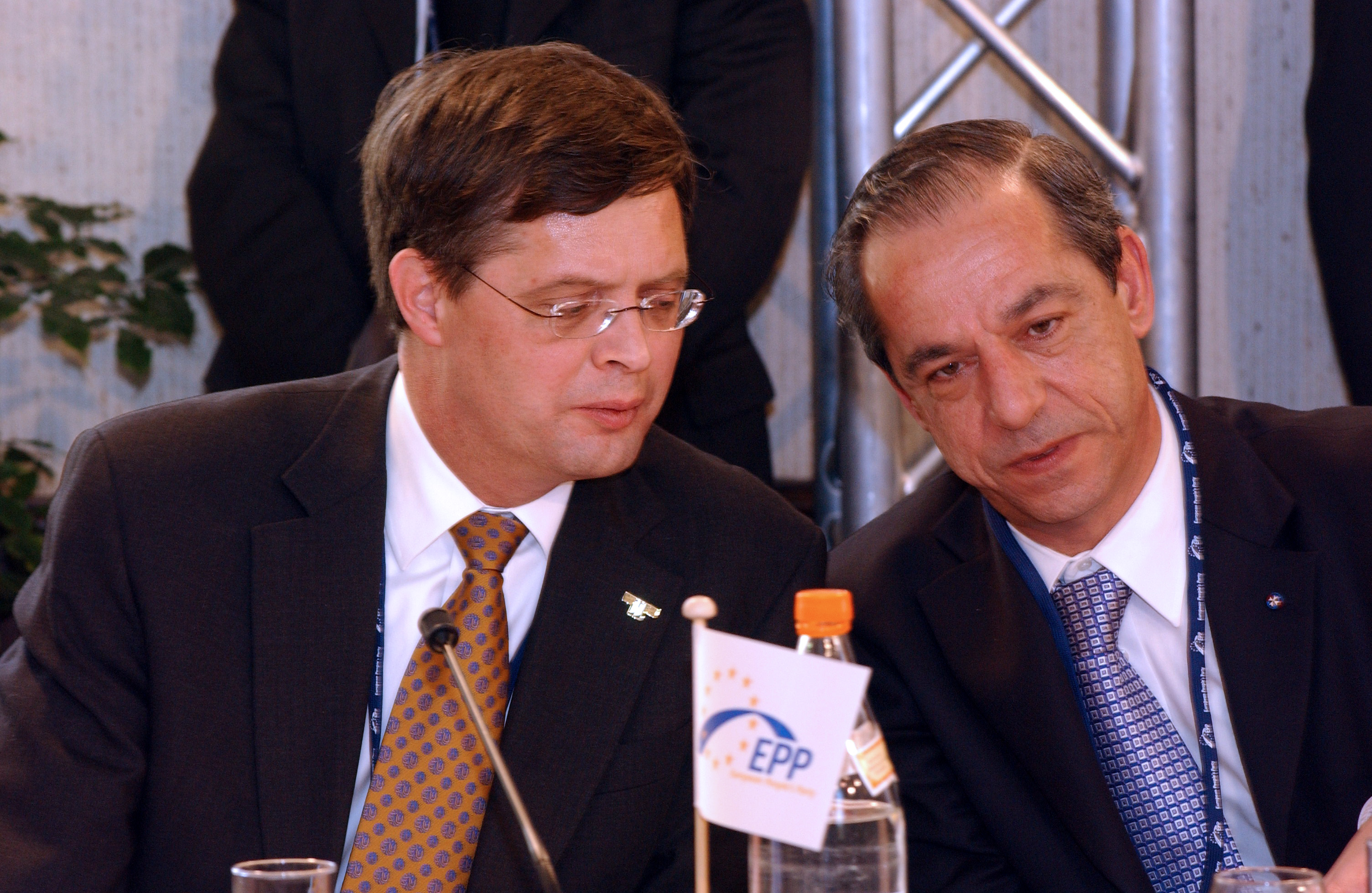 EPP Summit 23 March 2006